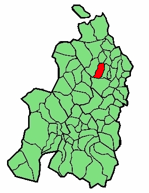 aipaturiko udalerriaren kokapena Nafarroa Beherean